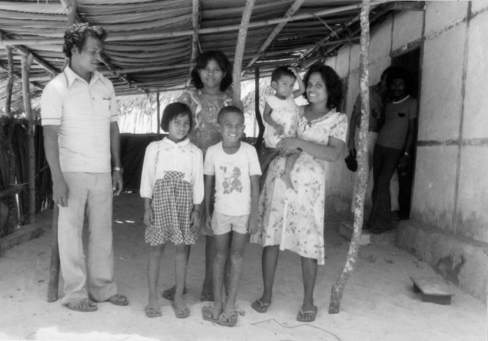 Negatief. Familieportret van het gezin van de dorpsonderwijzer van Kandar